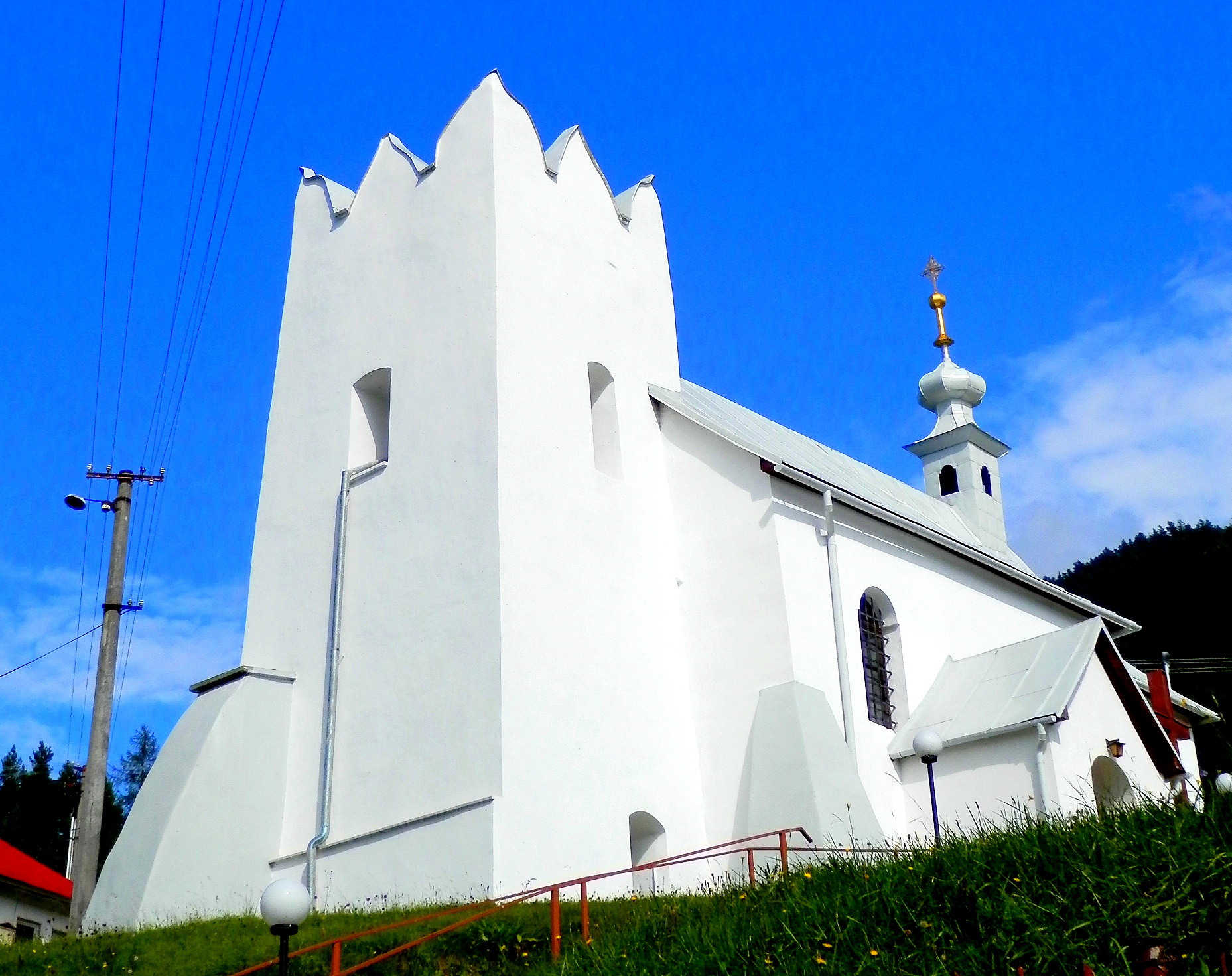 Renesančný kostol svätého Michala z druhej polovice 13.storočia. Obec Harakovce, okres Levoča.